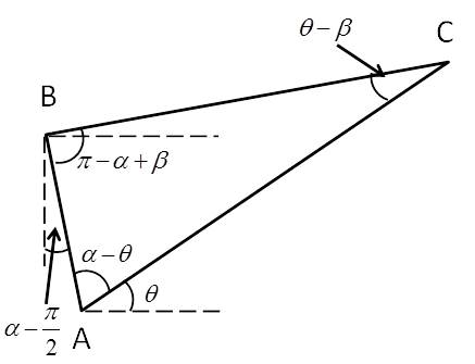 受働土圧時のくさび